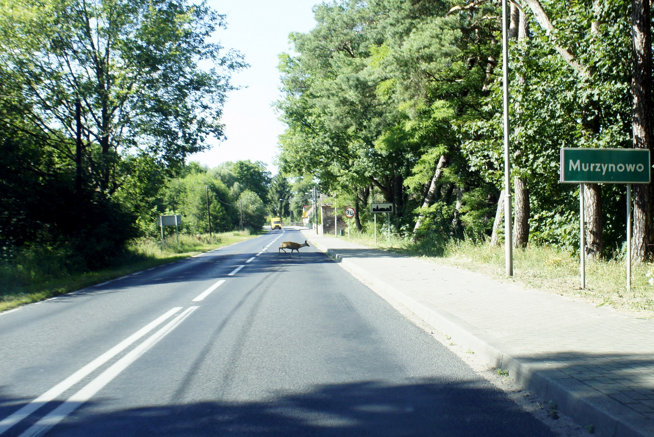 Murzynowo w woj. lubuskim. Wjazd do wsi od południa, drogą wojewódzką nr 159.